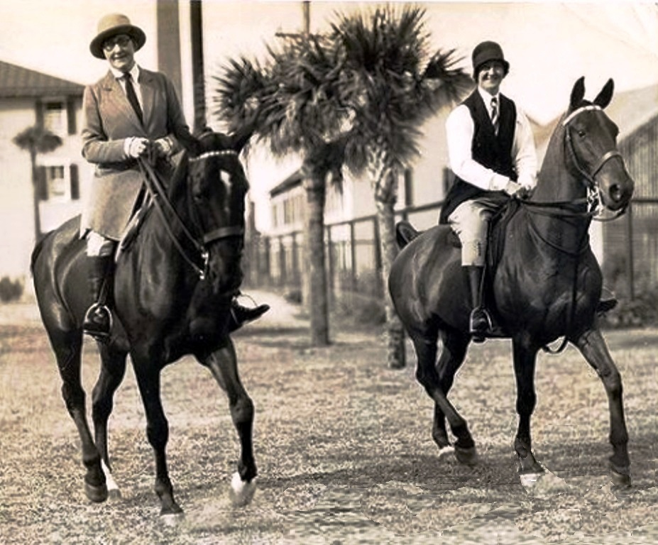 Pelegrina Pastorino (Pele) y Maria Rosa Oliver, Club Ecuestre del Hurlingham Club, Pilar, Buenos Aire, por Chicha Pereyra-Iraloa 1938